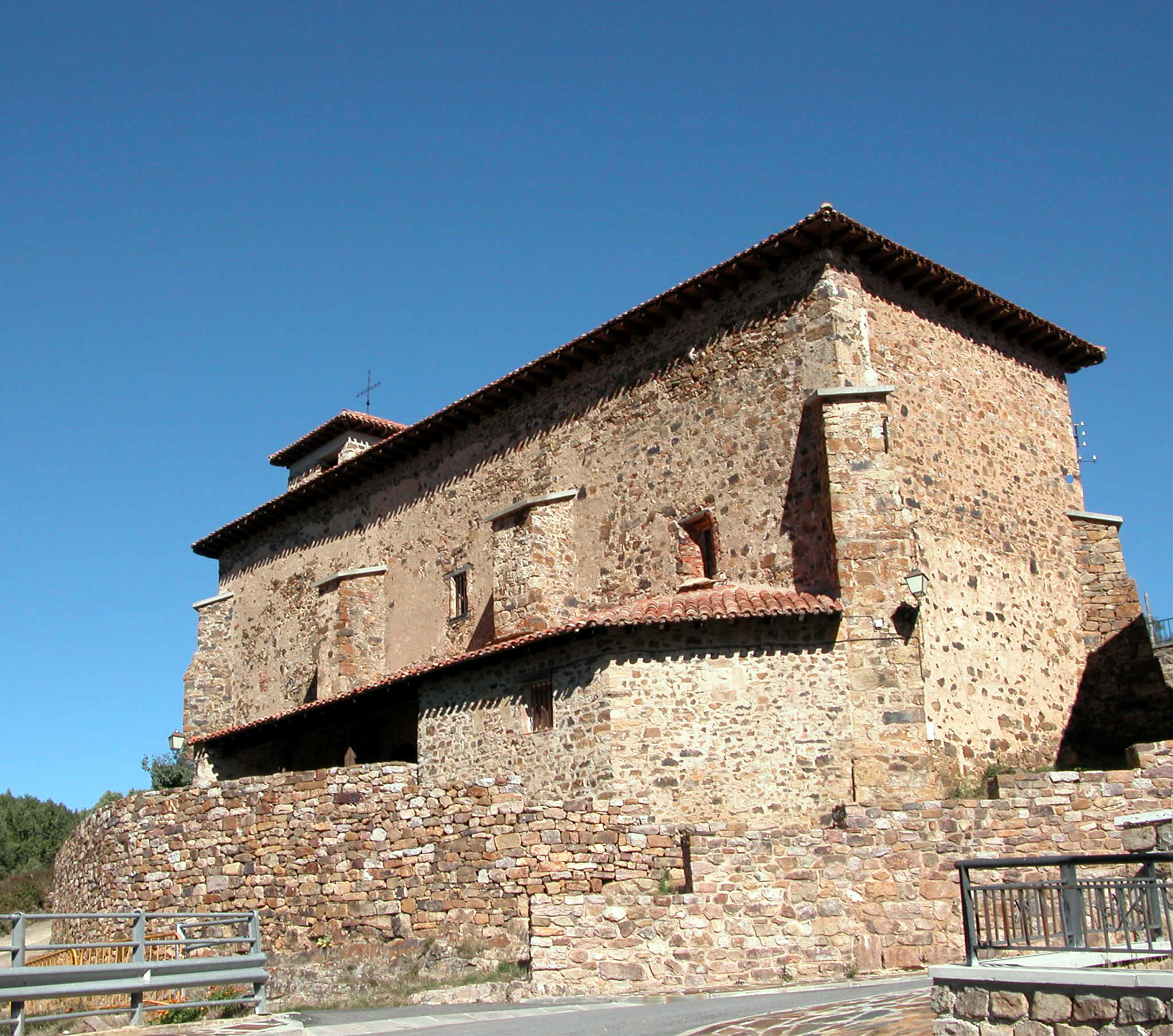 Iglesia parroquial de la localidad de San Andrés (Lumbreras), La Rioja - España.